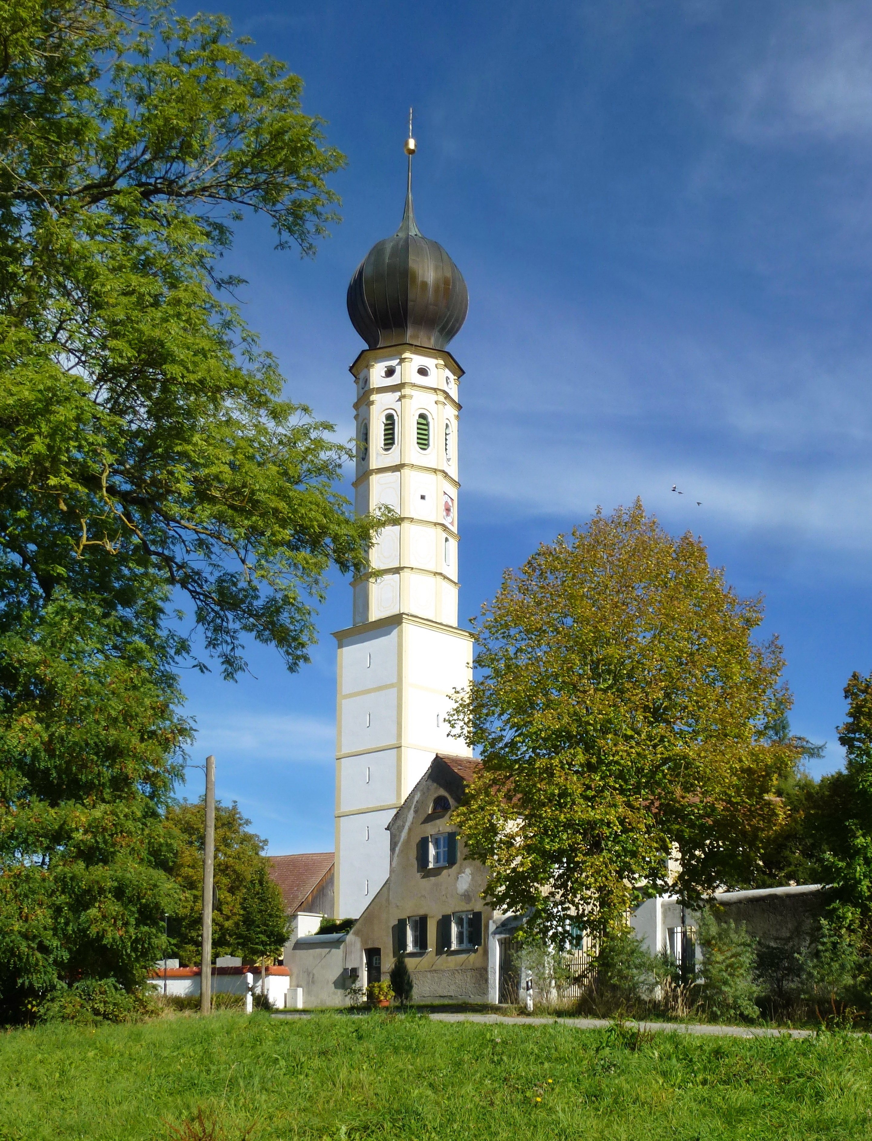 Sulzemoos, Kirchstr. 7: Katholische Pfarrkirche St. Johannes der Täufer. Ansicht von SW